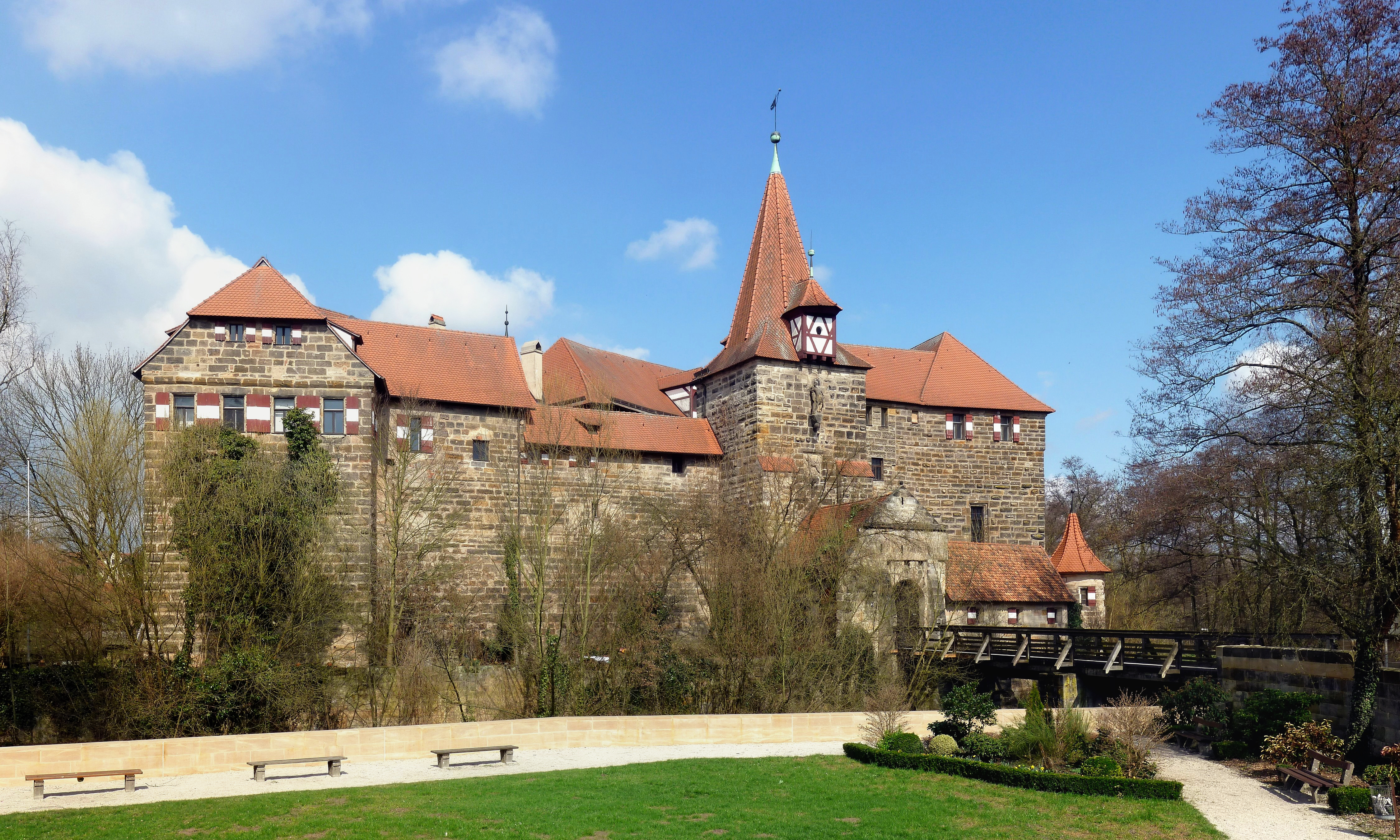 Wenzelschloss bei Lauf an der Pegnitz. Die ehemalige Kaiserresidenz liegt auf einer Insel in der Pegnitz in Franken. Die heutige Anlage wurde im 14. Jahrhundert erbaut und wird seit 1985 von der Akademie der Bildenden Künste Nürnberg als Außenstelle genutzt. Im Schloss ist der wohl europaweit bedeutendste Wappensaal aus dem Jahre 1360 mit etwa 120 Wappen erhalten.